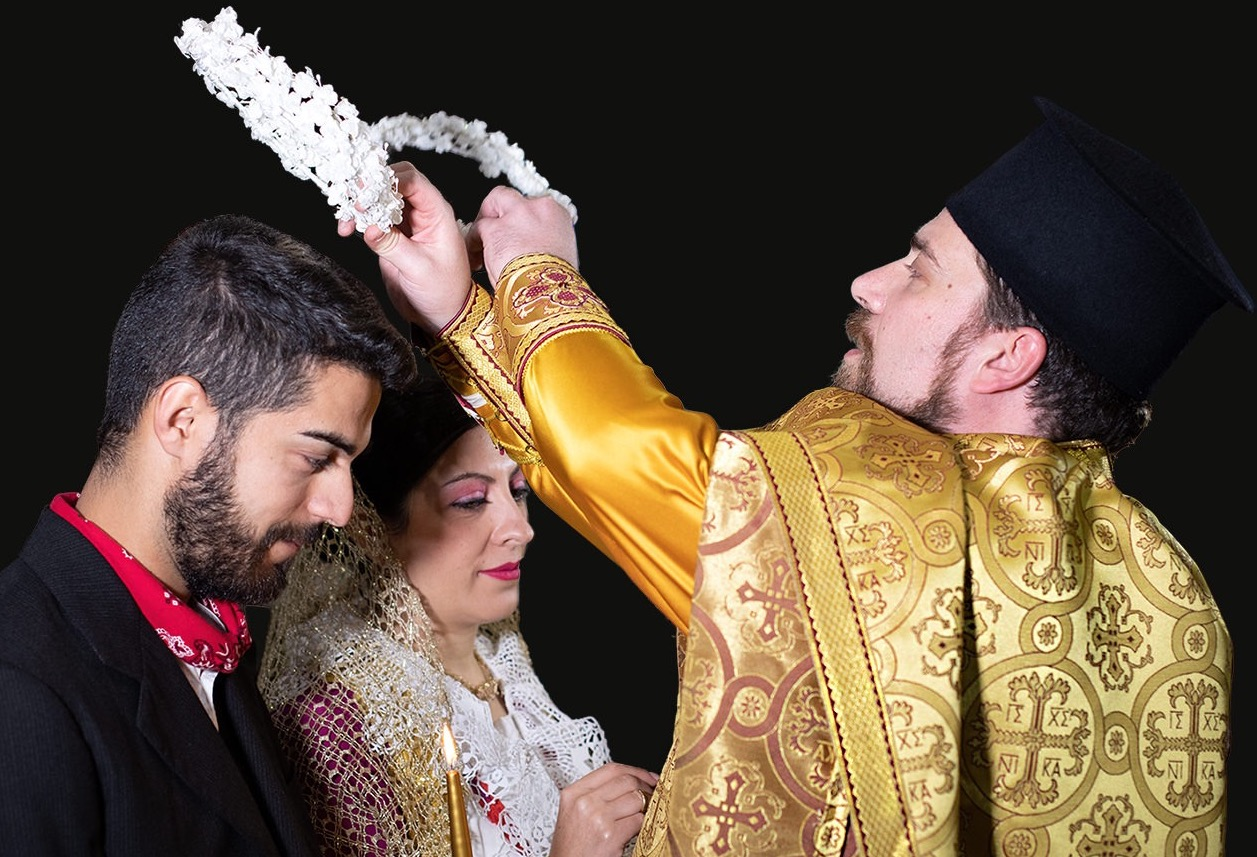 Matrimonio italo-albanese in Calabria, Zoti Prifti Papa Zef Barrale, San Cosmo Albanese (CS).